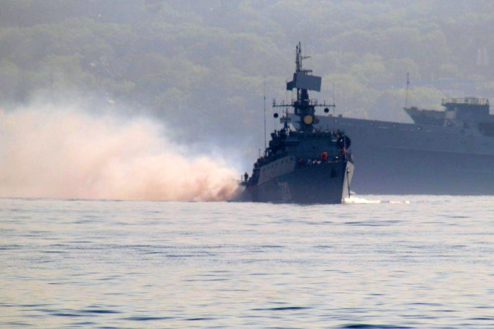 МПК Метель 2014.06.01